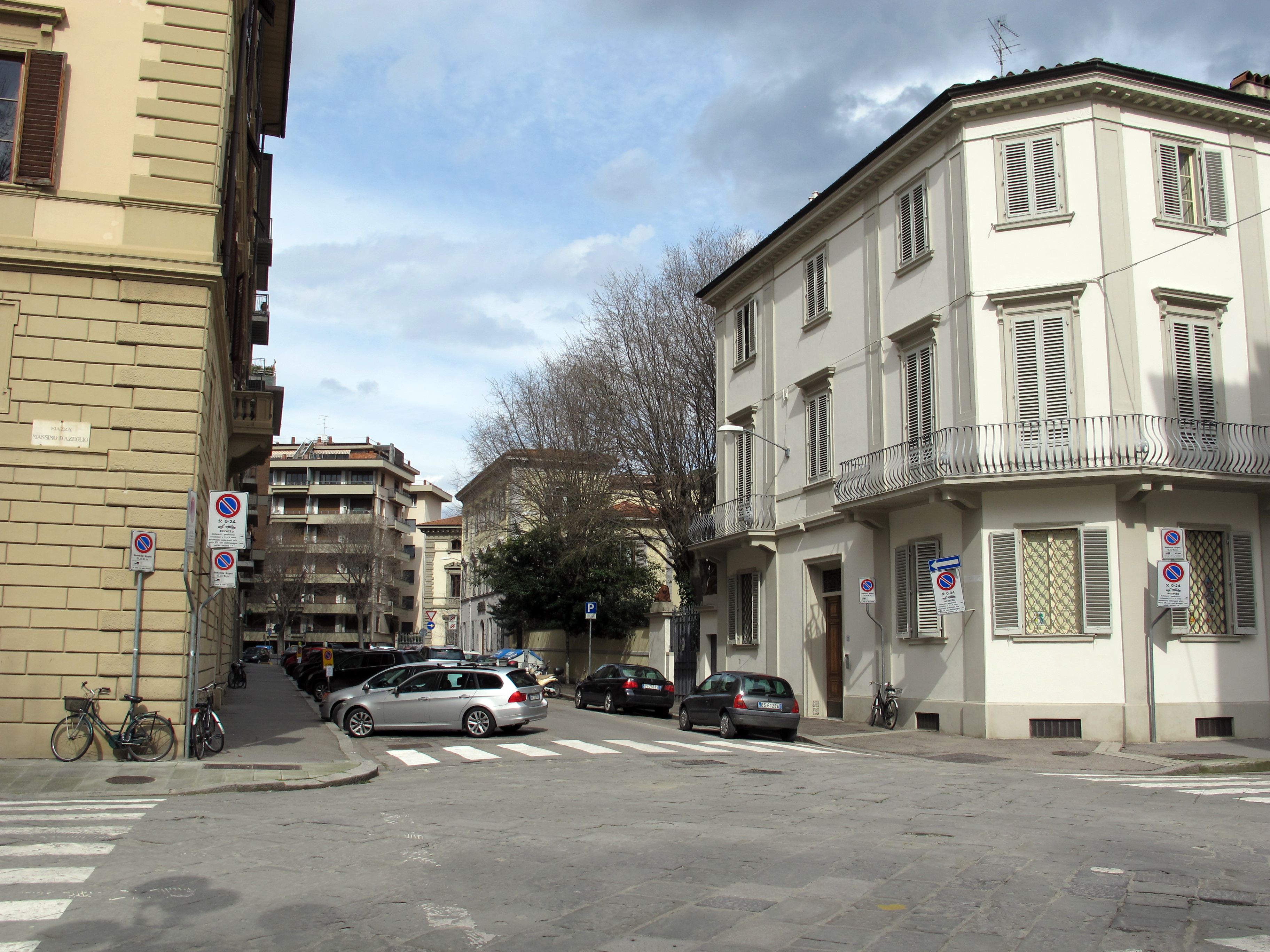 Via pellico, veduta